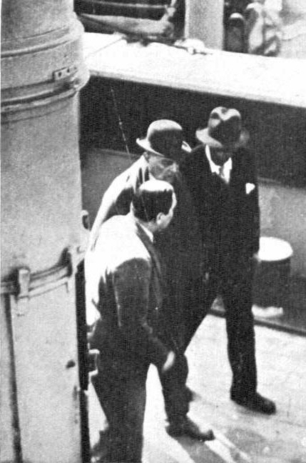 Instantes en que Hipólito Yrigoyen es trasladado hacia la isla Martín García